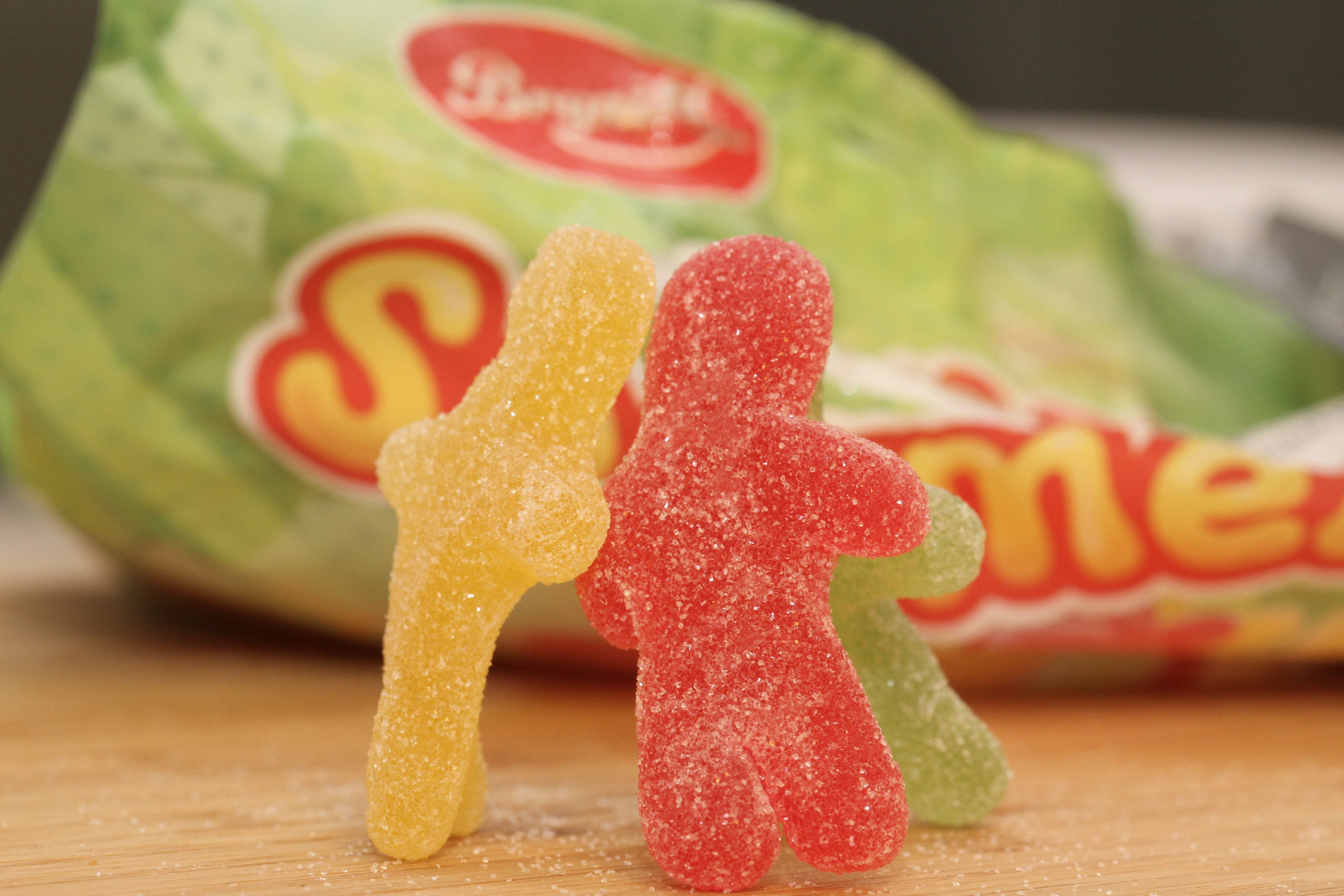 Brynild Seigmenn, en type seigmenn i salg i Norge.